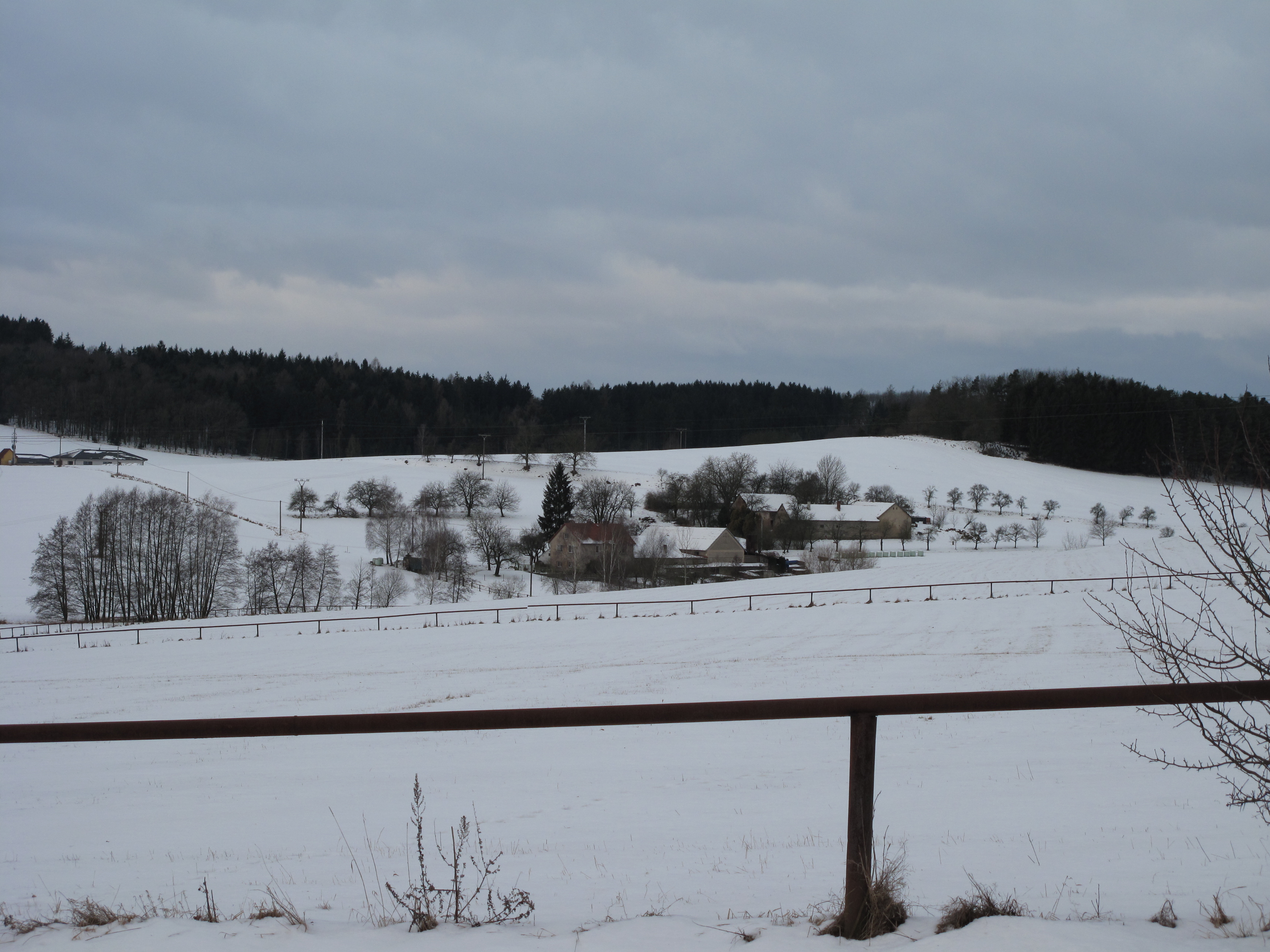 Domy v Babčicích. Okres Benešov, Česká republika.